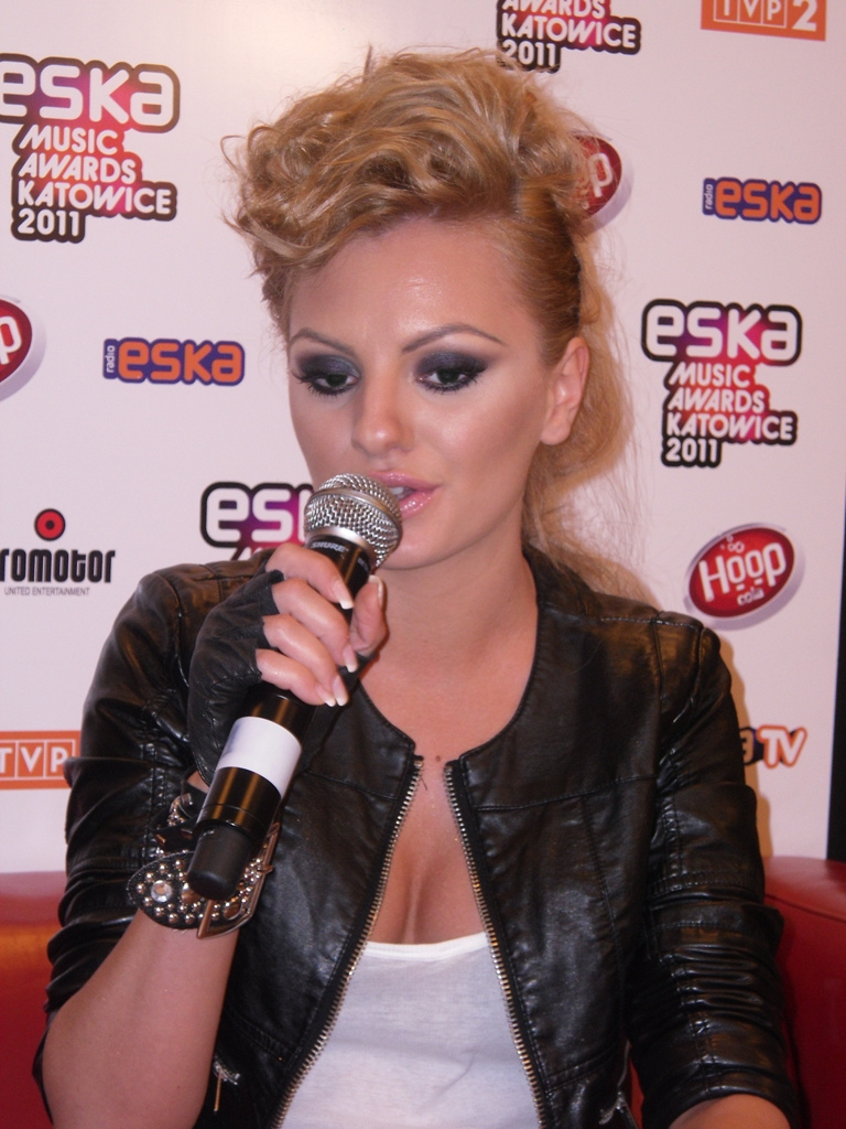 Alexandra Stan Zdjęcie zrobione podczas Eska Music Awards 2011 w katowickim Spodku.